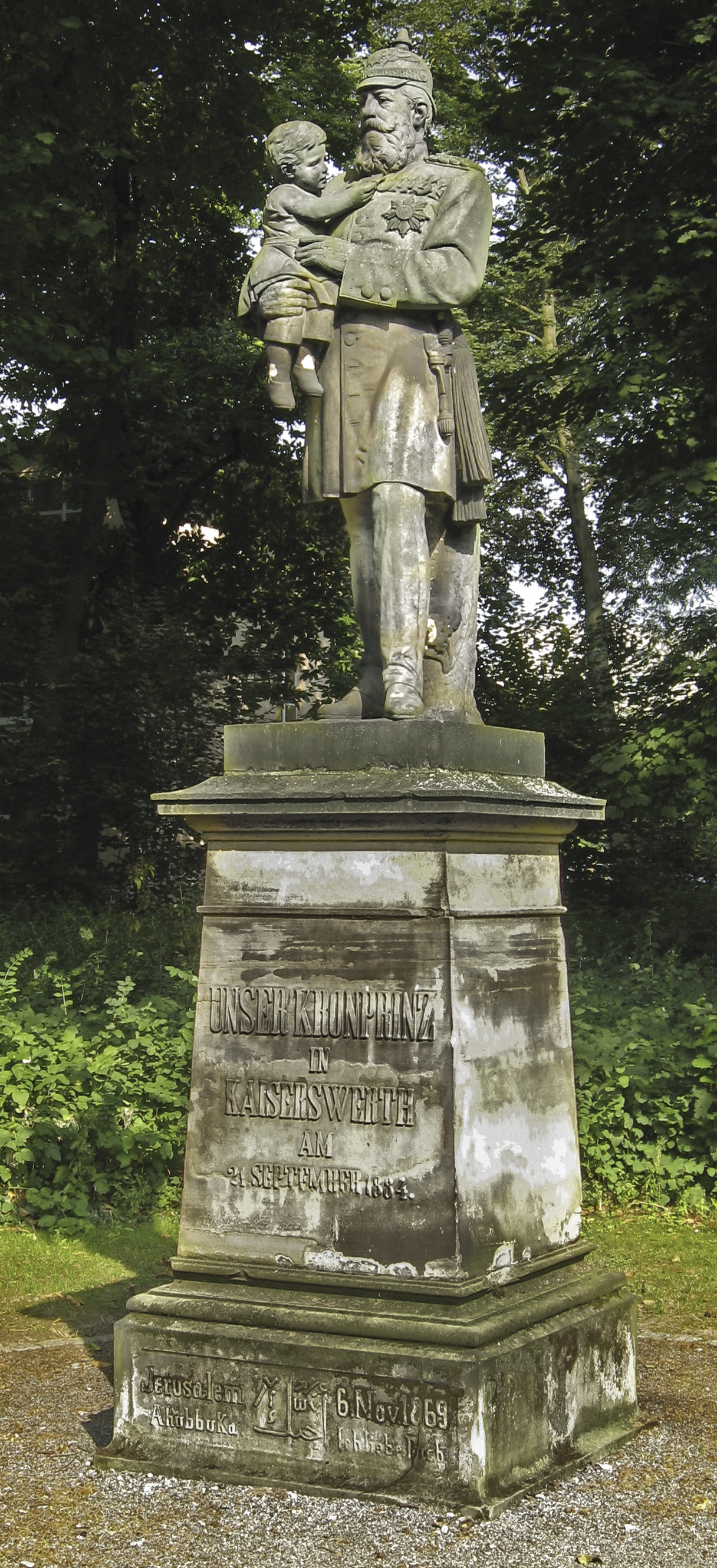 Das Denkmal auf dem Gelände der Kaiserswerther Diakonie erinnert an den Besuch des späteren Kaisers Friedrich III. als Kronprinz am 11. Sept. 1884 und zeigt ihn mit dem 4-jährigen Kinderkrankenhaus-Patienten Wilhelm Kroll auf dem Arm.